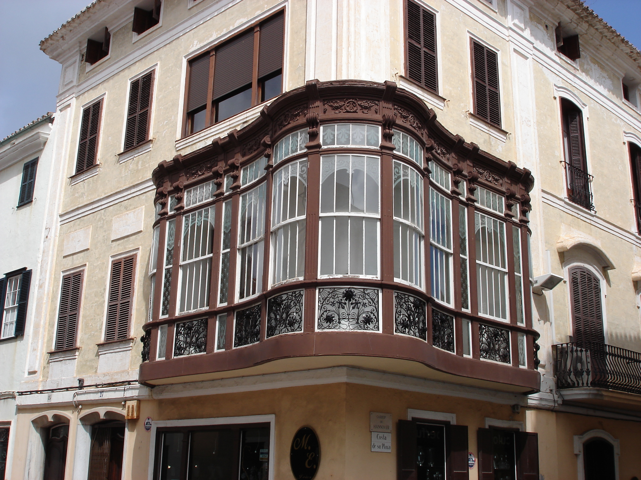 Boinder de la Costa de sa plaça de Maó